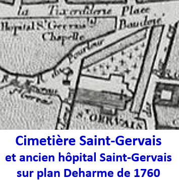 Cimetière et hôpital St-Gervais sur plan Deharme de 1760